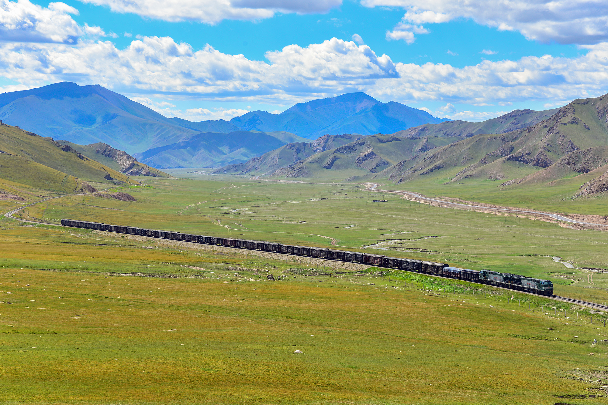 photo by Xundaogong 巡道工出品